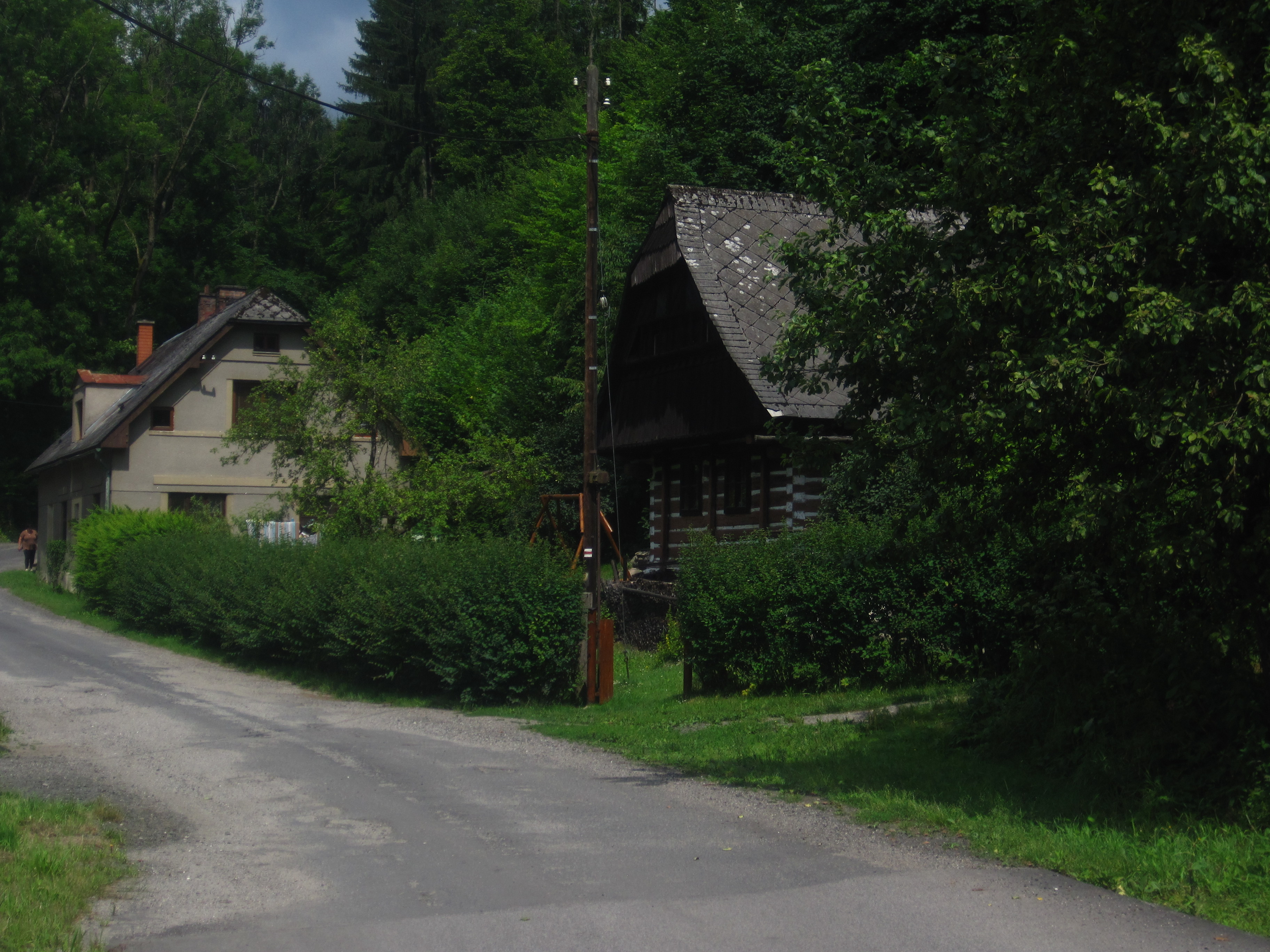 Usedlost čp. 130, Jesenný 130, při nádraží, Jesenný.